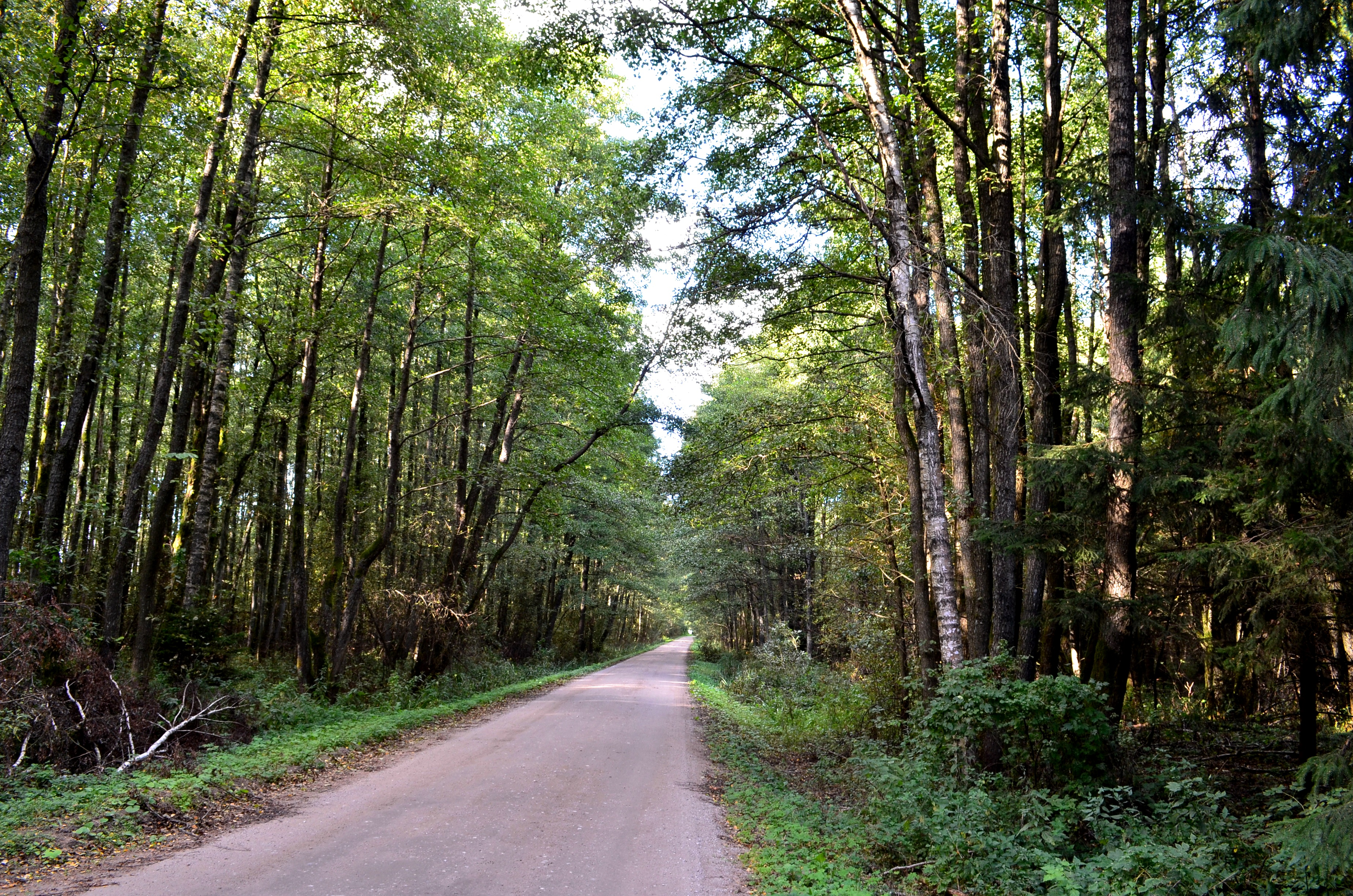 Kintų miškas, Šilutės raj.